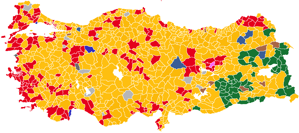 Gewinner Parteien in Wahlbündnissen in Kreisen